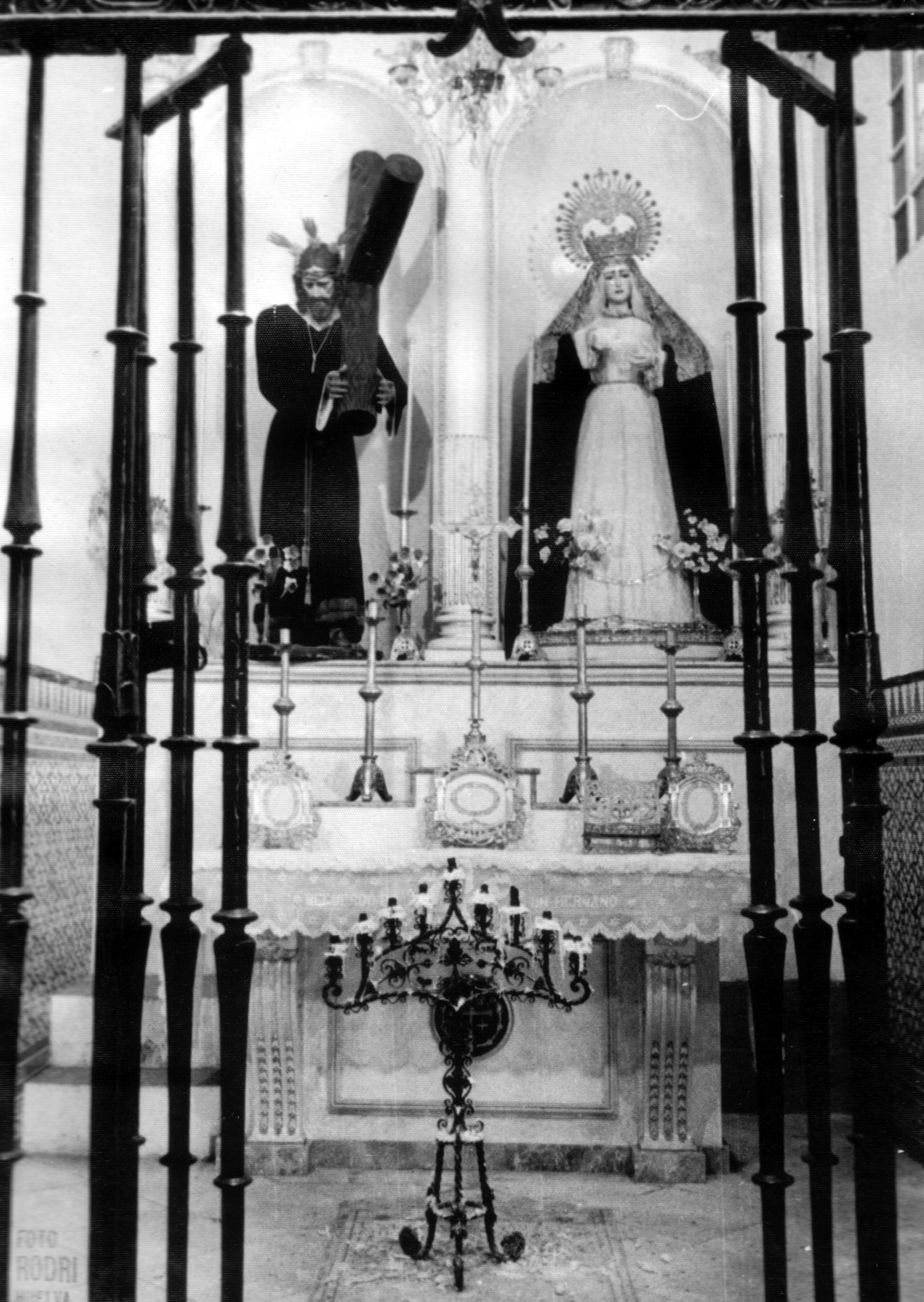 Capilla Inmaculada Concepción Hermandad Pasión Huelva